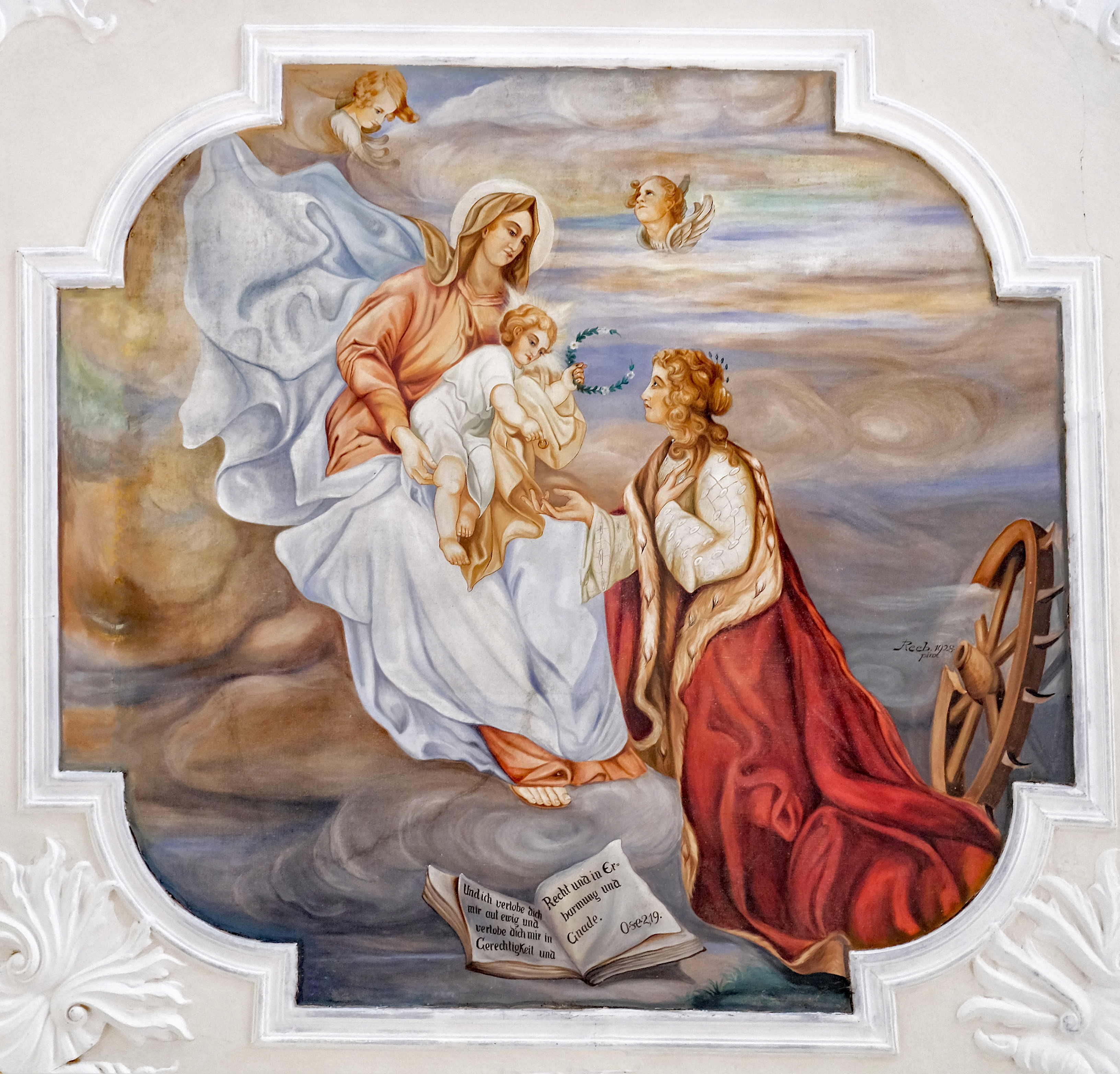 Deckengemälde mit der Heiligen Katharina, der Gottesmutter Maria und dem Jesuskind sowie zwei Engelsfiguren, die die Töchter des Malers Max Reeb zeigen, in der Ehemaligen Schlosskapelle Rötlen.